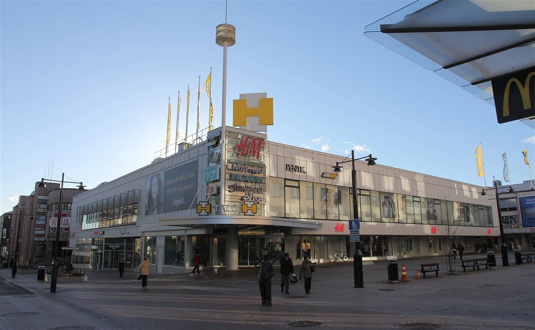 H-talo (aiemmin myös H-tavaratalo) on 1. maaliskuuta 1966 avattu, Suomen ensimmäinen kauppakeskus. Se sijaitsee Kuopion torin lounaiskulmalla (Multimäen kaupunginosassa), osoitteessa Kauppakatu 32.